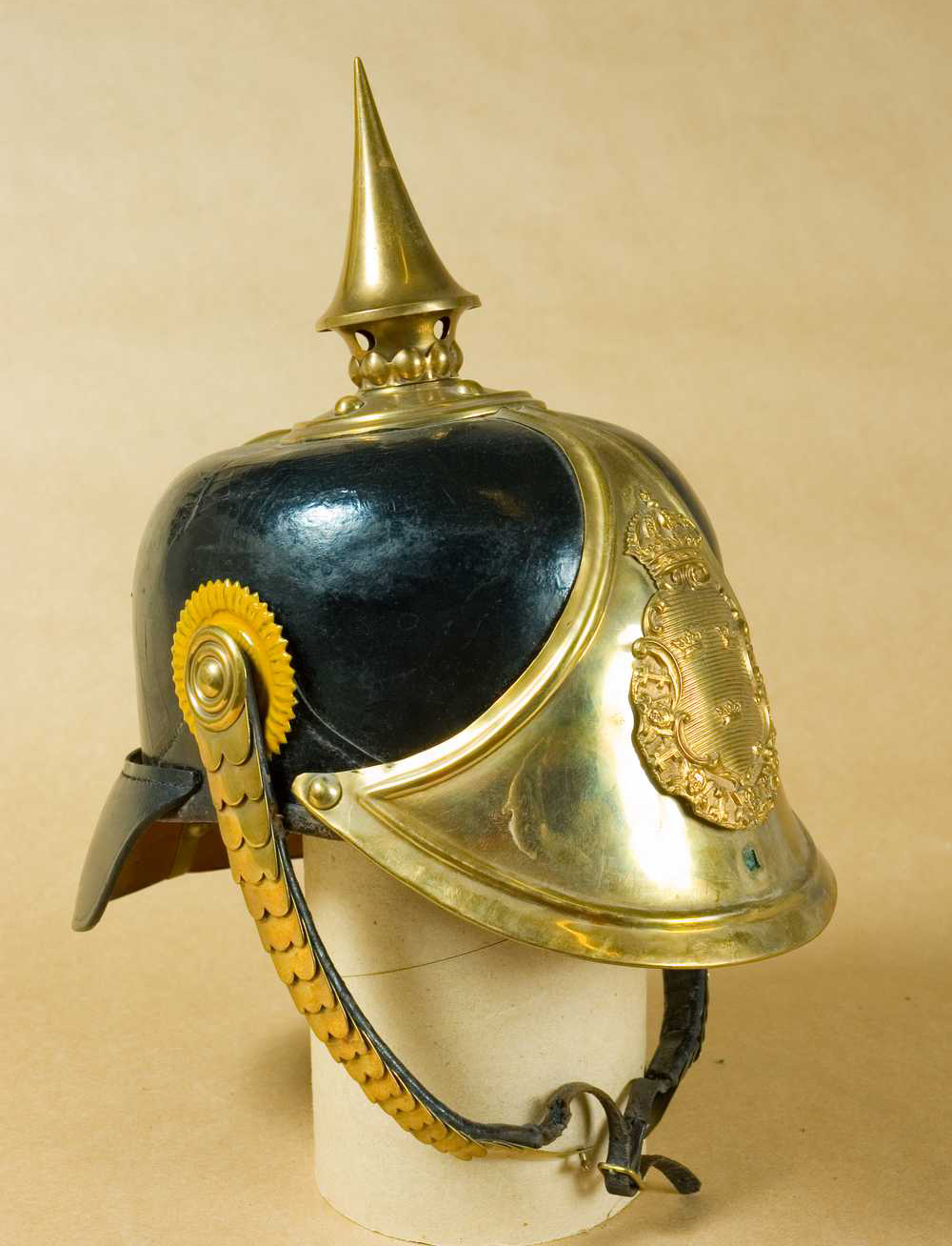 Hjälm m/1886 för manskap vid Skånska dragonregementet (K6) och Norrlands dragonregemente (K8).